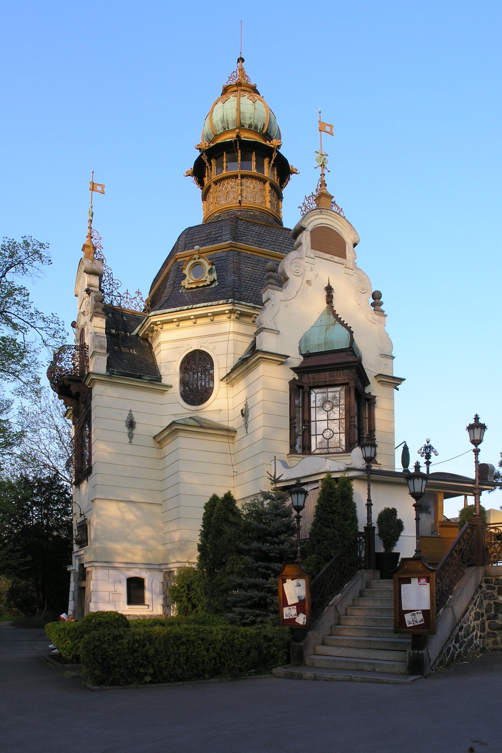 Hanavský pavilon v Praze, Letenských sadech